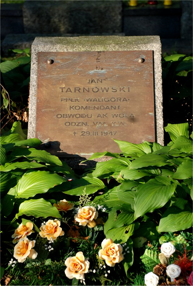 Jan Tarnowski (podpułkownik), Powązki wojskowe w Warszawie